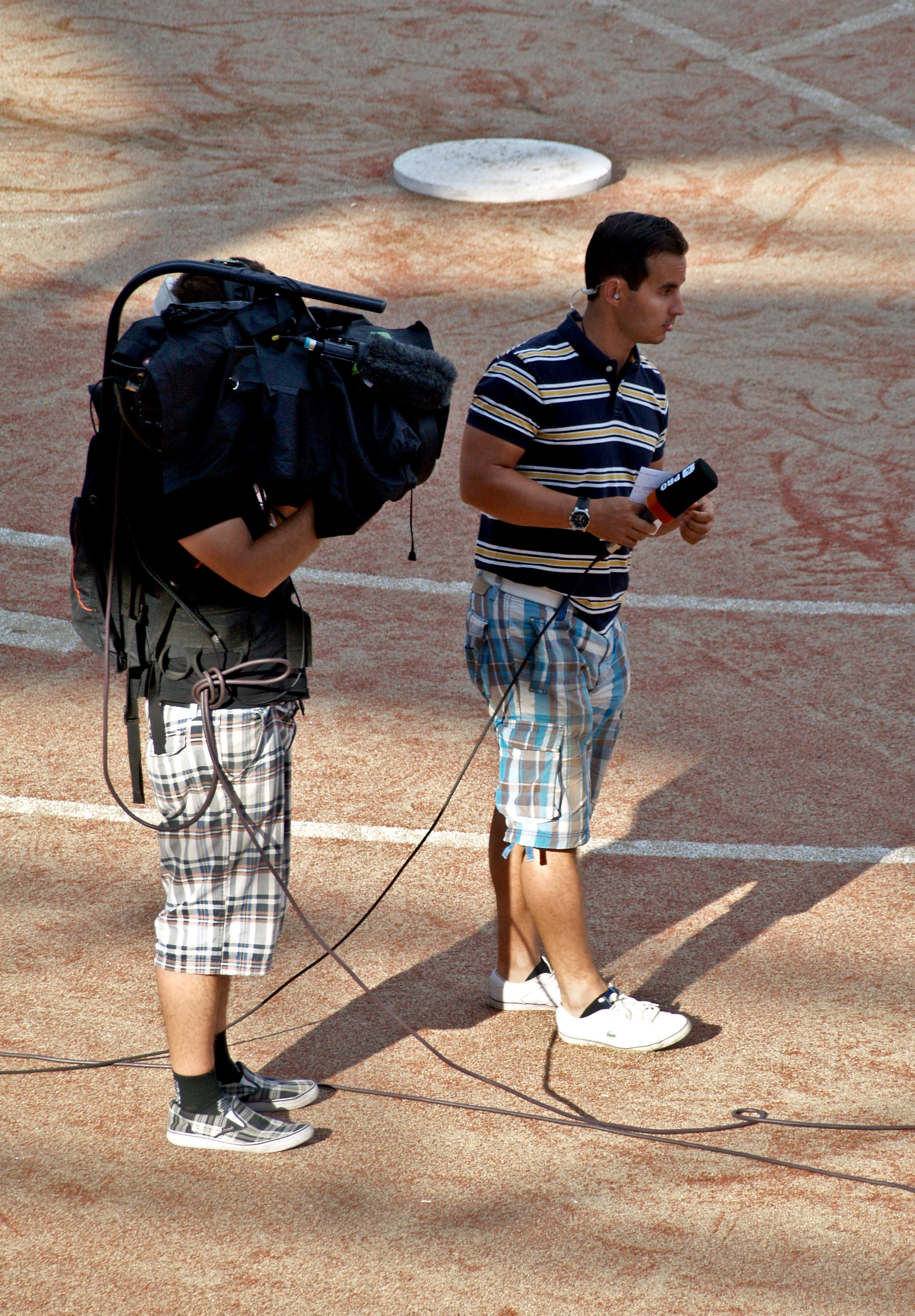 Vimpelin Veto - Koskenkorvan Urheilijat pesäpallo-ottelu 1.8.2014. Kuvassa toimittaja ja urheiluselostaja Sebastian Waheeb.